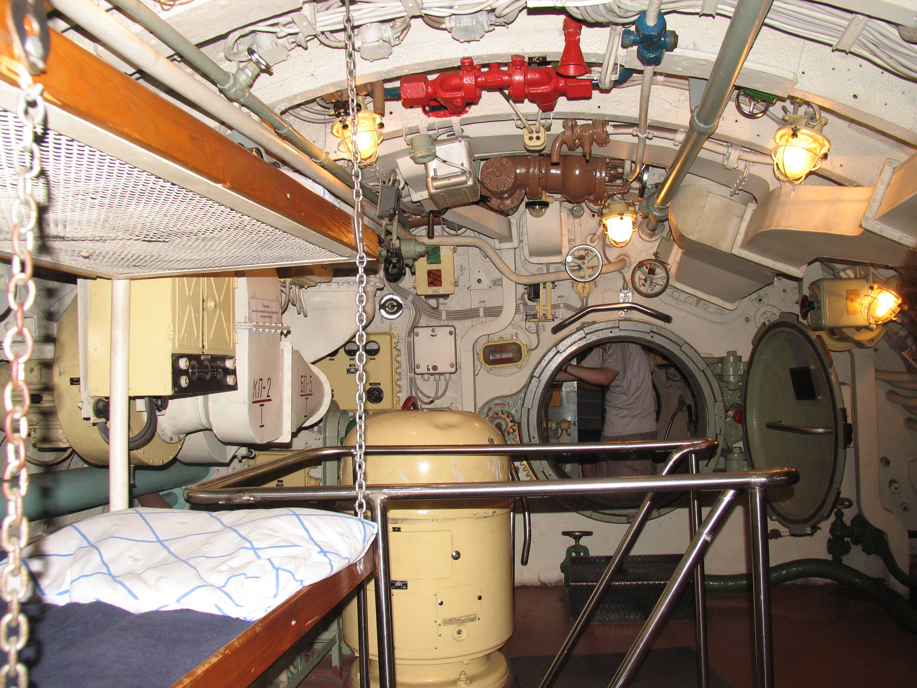 Подводная лодка Д-2 «Народоволец». Пятый отсек. Вид в сторону носа.